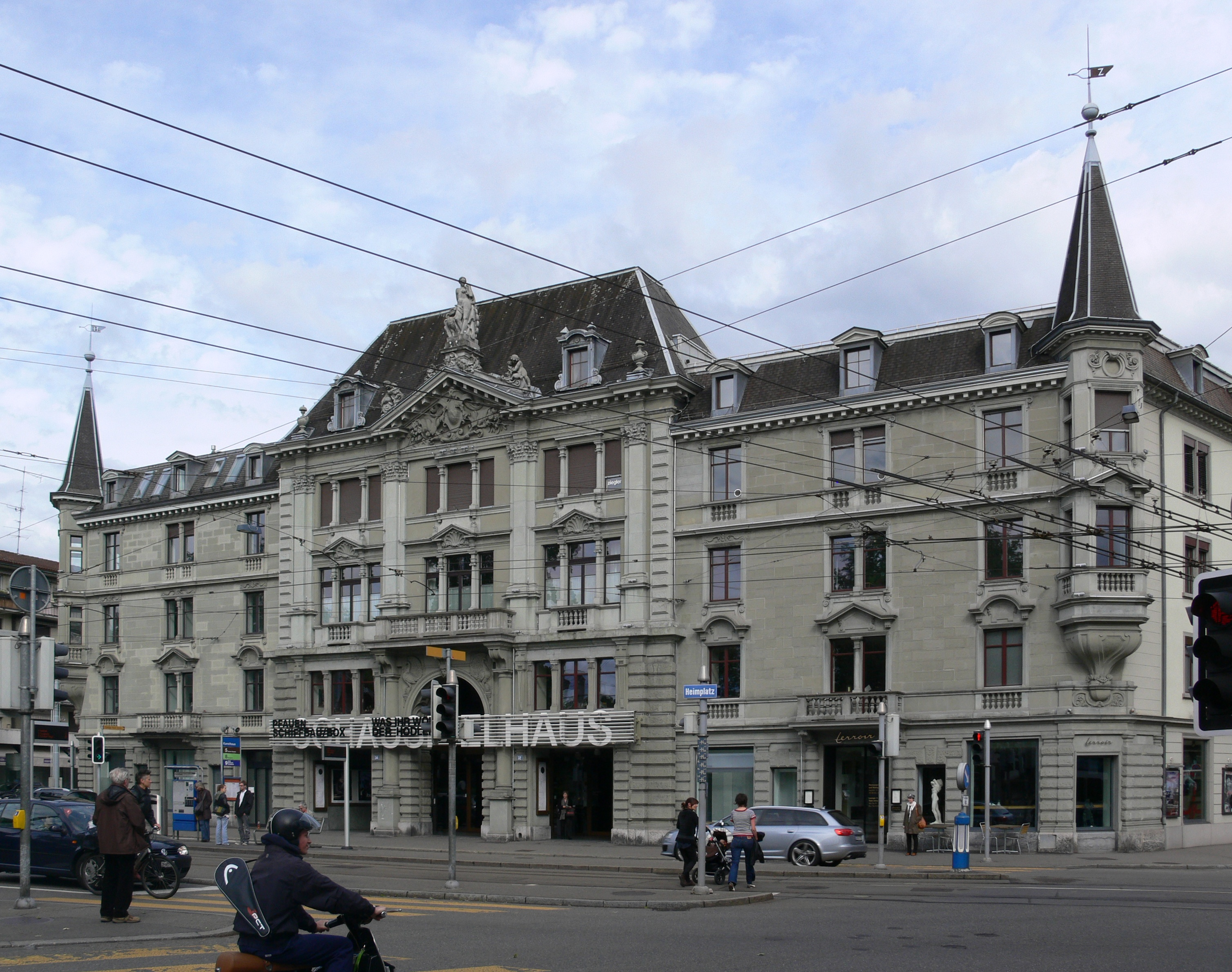 Schauspielhaus Zürich („Pfauen“)